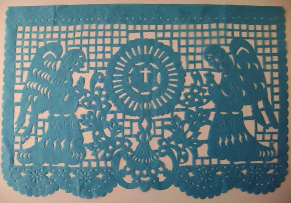 ejemplo de papel picado